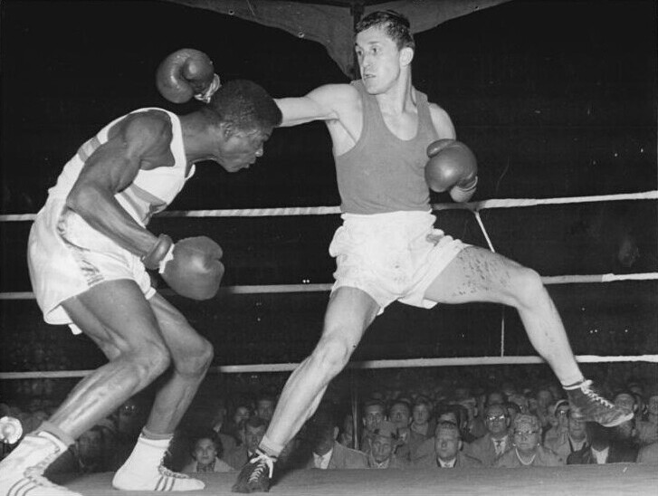 Clement Quartey, Wilfried Rühl Zentralbild Semeniuk 16.9.1962 Ghanesische Boxer unterlagen. Die deutsche Box-Nationalmannschaft besiegte am 15.9.62 in der Schweriner Freilichtbühne die ghanesische Nationalstaffel mit 124 Punkten. UBz: Den wertvollen Sieg verbuchte dabei der Schweriner Wilfried Rühl (rechts), der den Silbermedaillengewinner von Rom im Halbweltergewicht Clement Quartey, sicher nach Punkten bezwang.